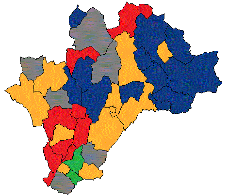 !Template:Llegenda}